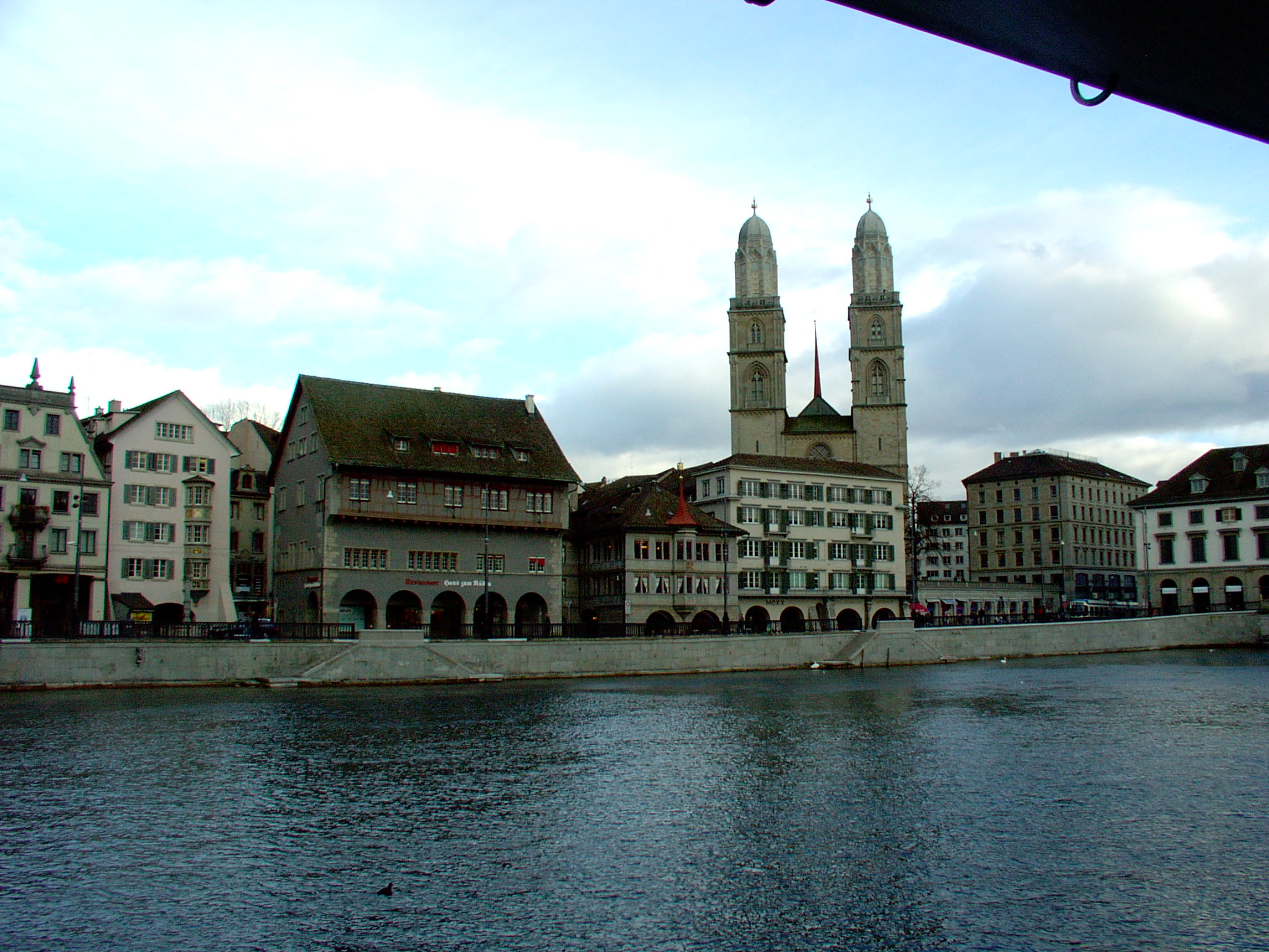 Limmat und Grossmünster